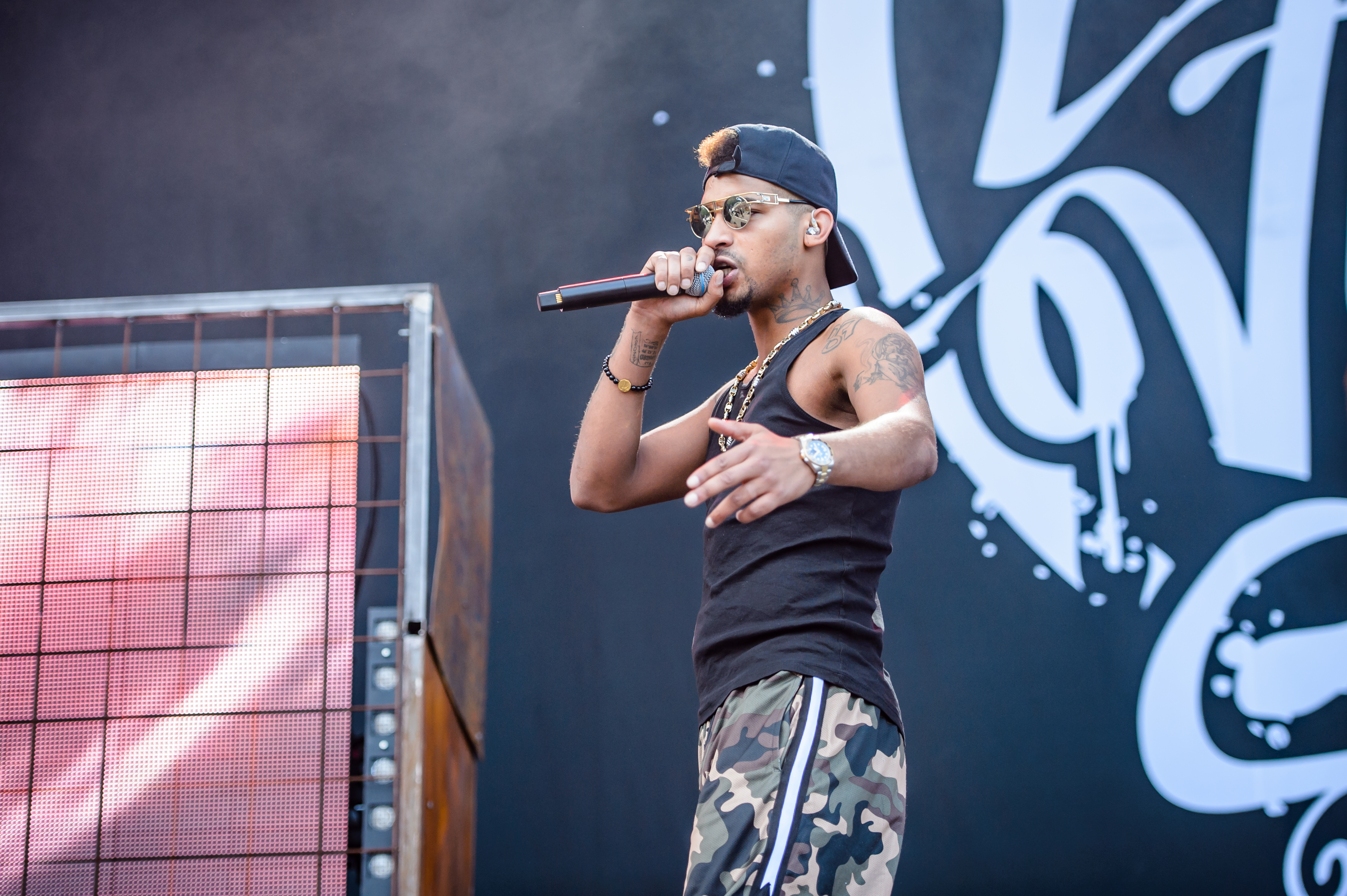 'Rock im Park 2017; Nürnberg': '187 Straßenbande'